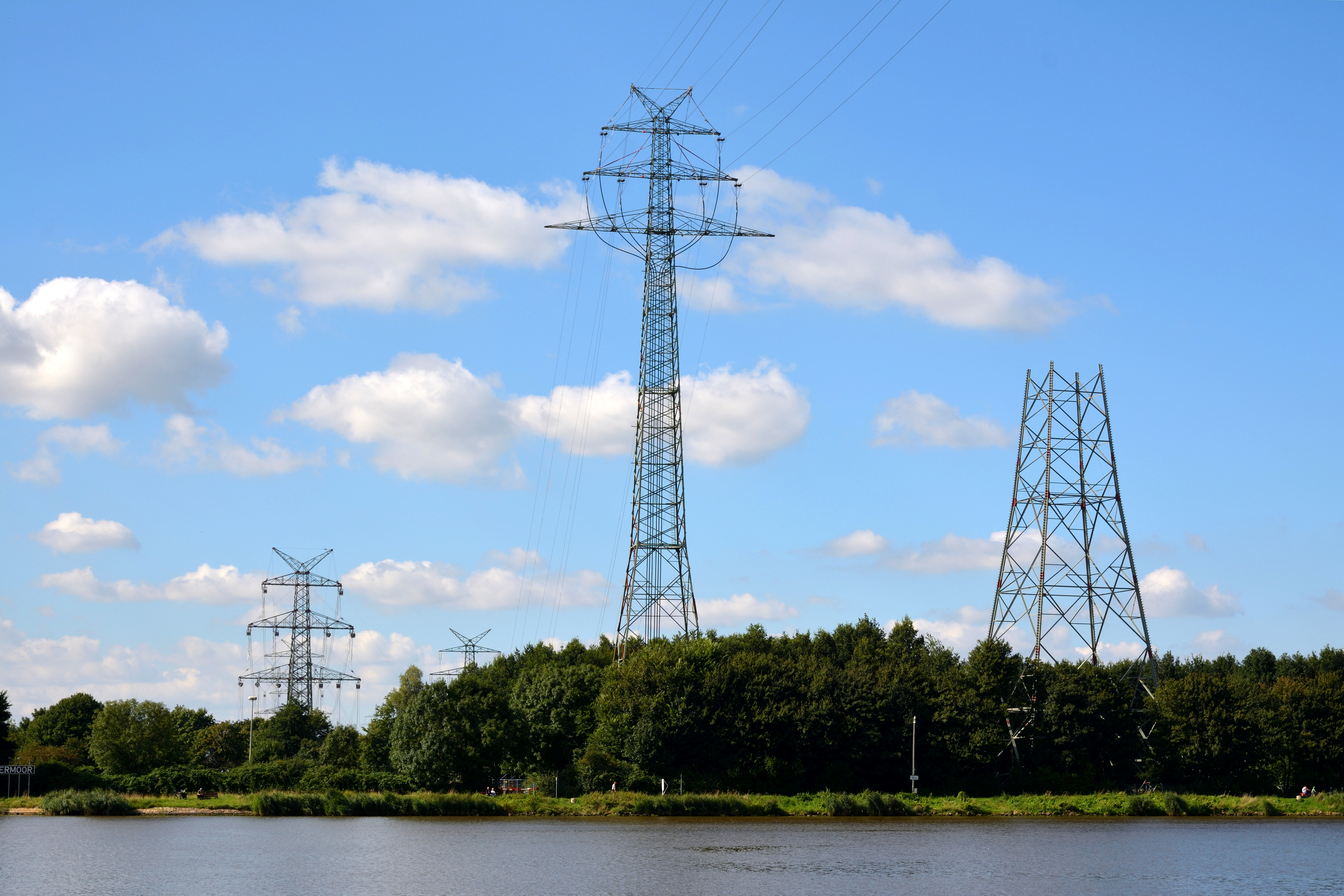 Neubau einer Hochspannungsleitung (Westküstenleitung) über den Nord-Ostsee-Kanal. Die Brückendurchfahrtshöhe beträgt 42 Meter, durch die Hochspannung wird die Entfernung zum Boden um einiges größer sein.